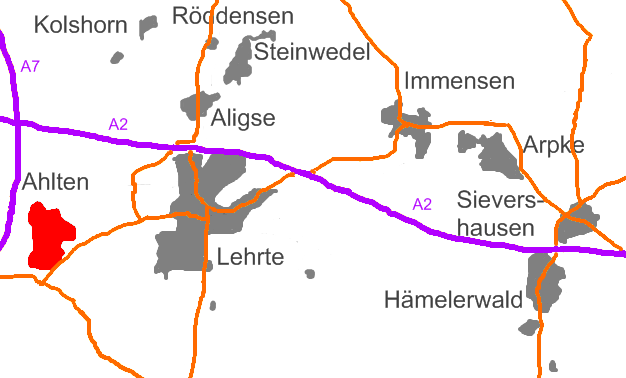 Lage von Ahlten als Ortsteil von Lehrte